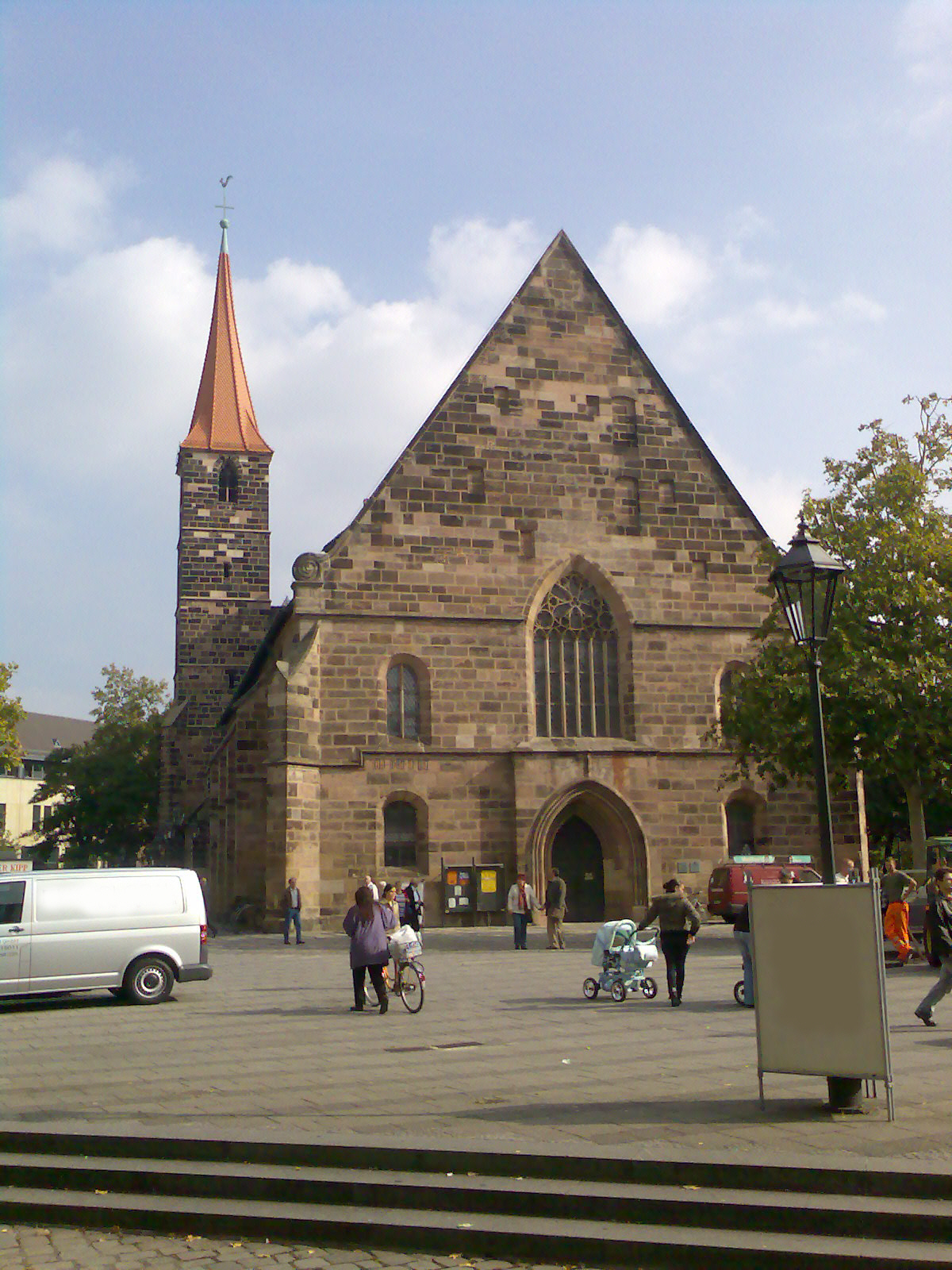 Jakobskirche Nürnberg - ehemalige Kirche der Deutschordenskommende - Jakobsmarkt